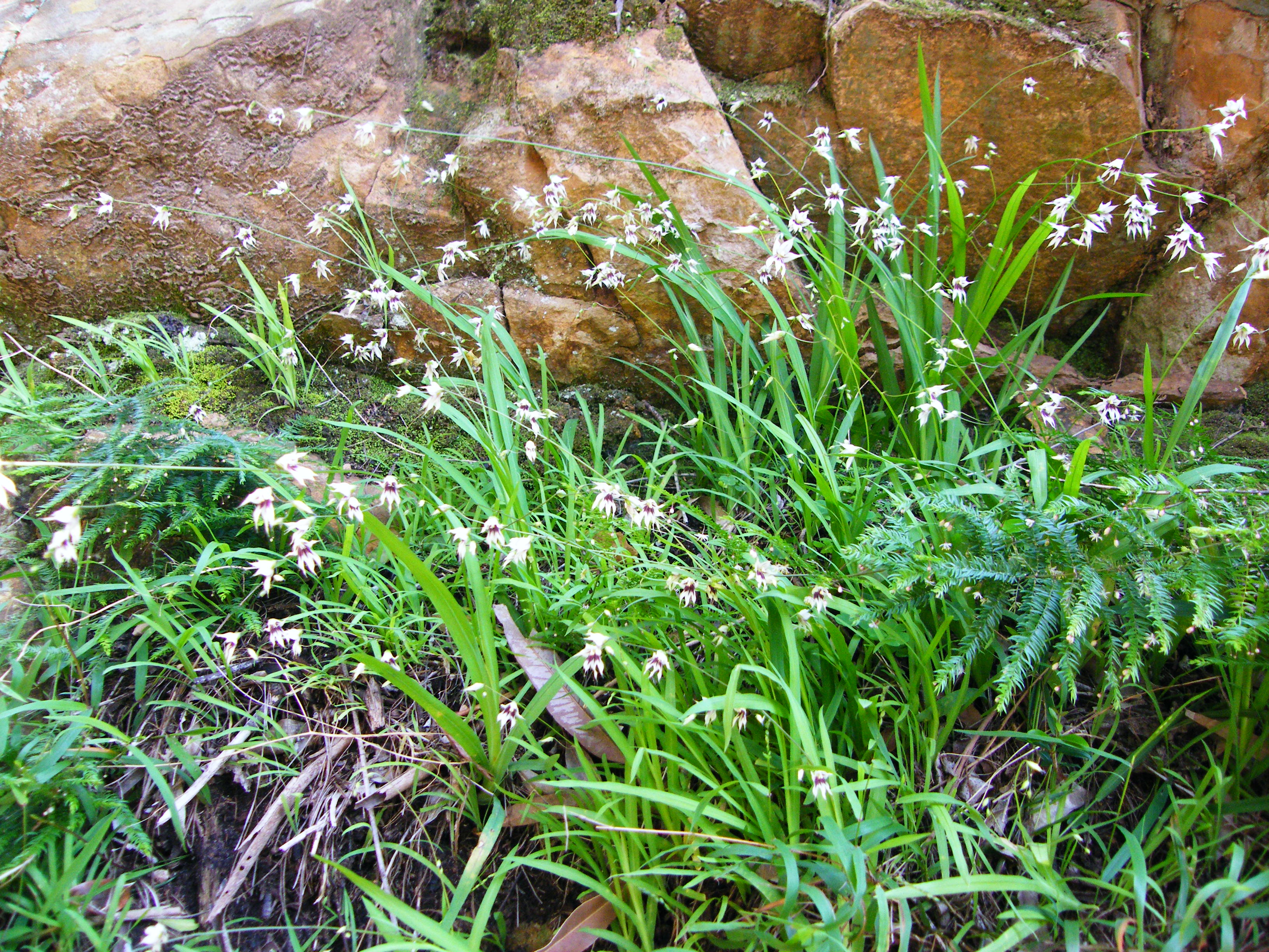 Baardmannetjie